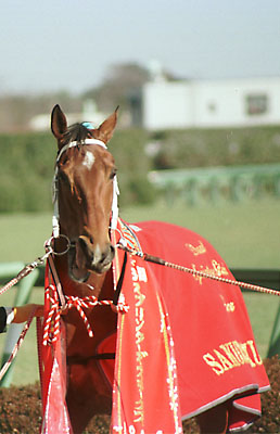 Sprinter'sStakes